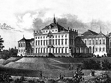 Das Residenzschloss Ludwigsburg im Jahre 1705.